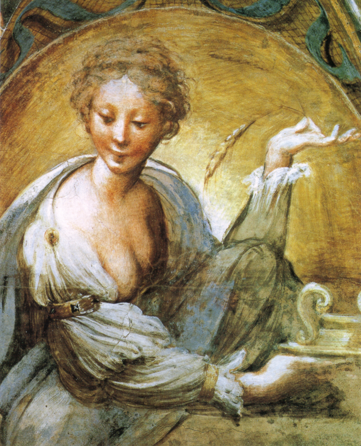 detail